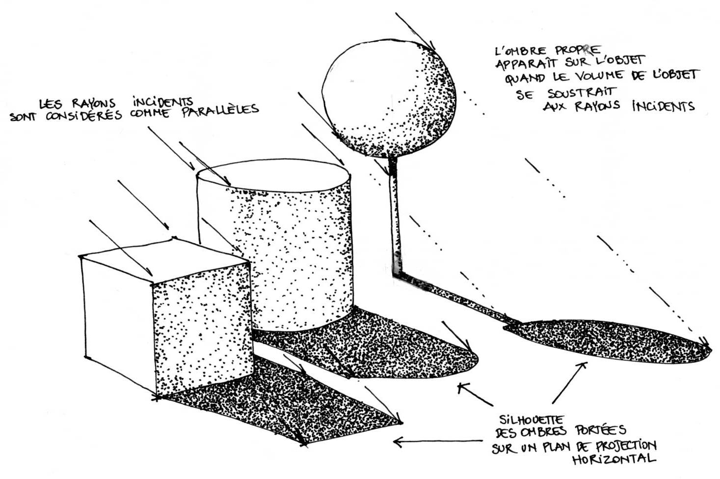 ombre propre et ombre portée Source croquis perso (own work)